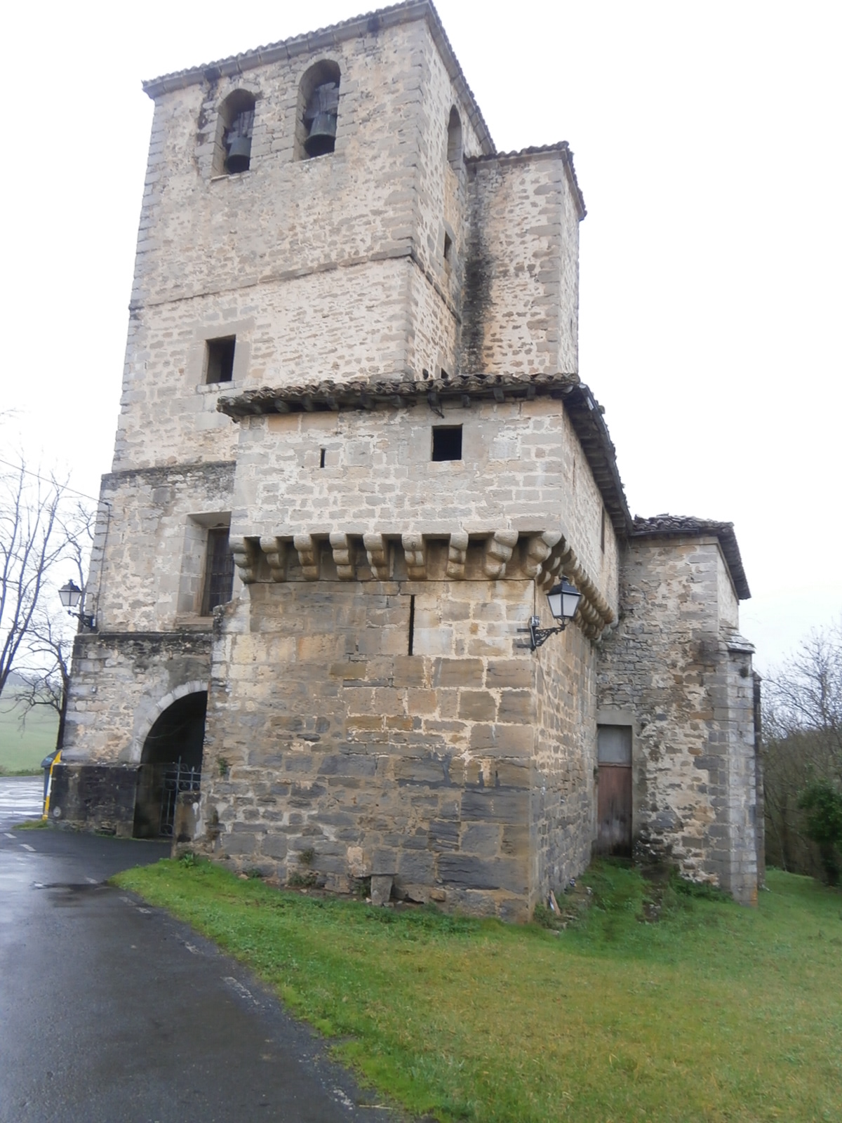 Iglesia de Soxo